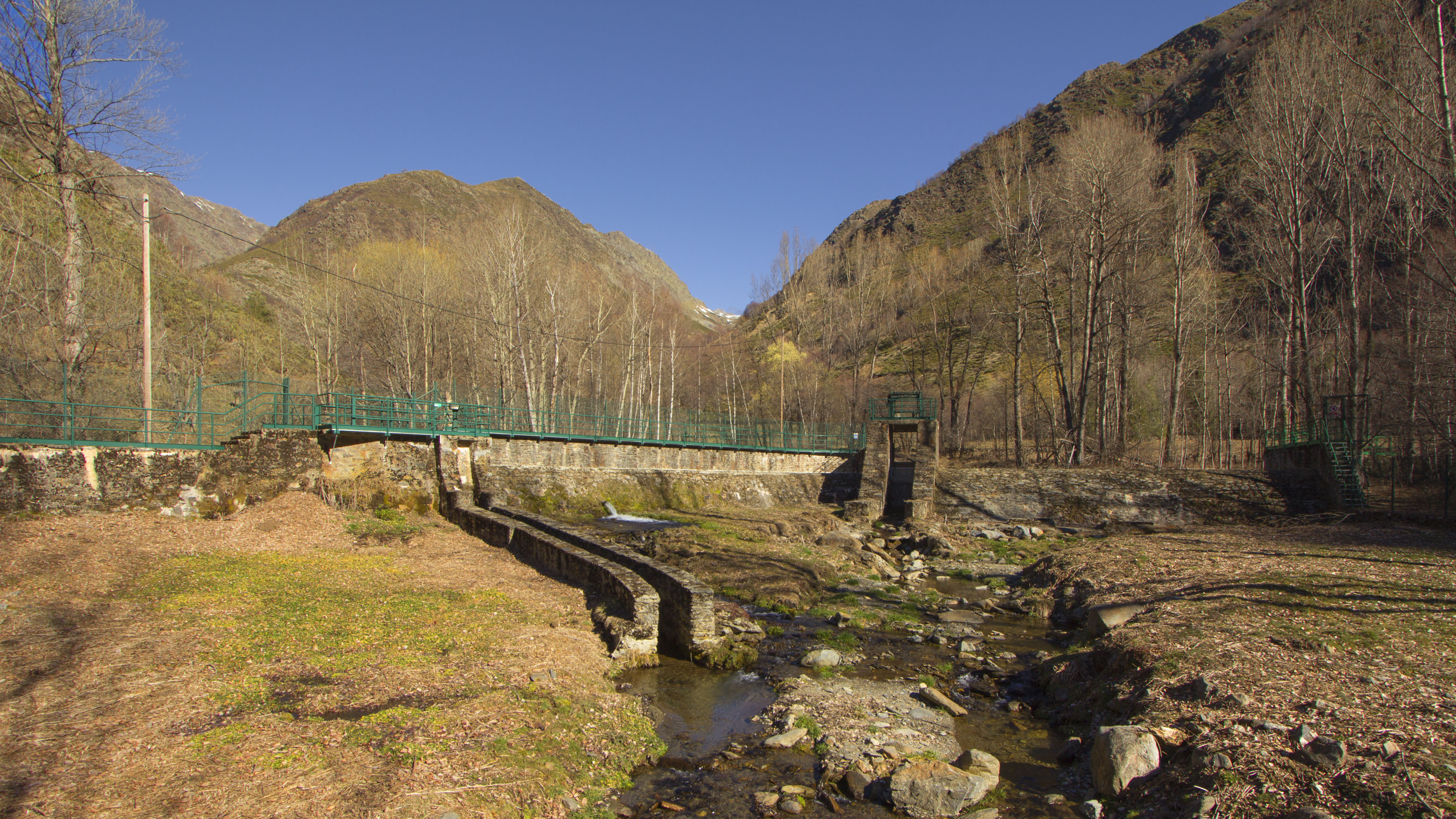 Presa de Cerbi (Pallars Sobirà)